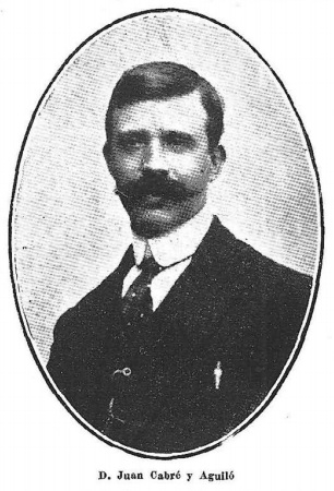 Retrato de don Juan Cabré y Aguiló.